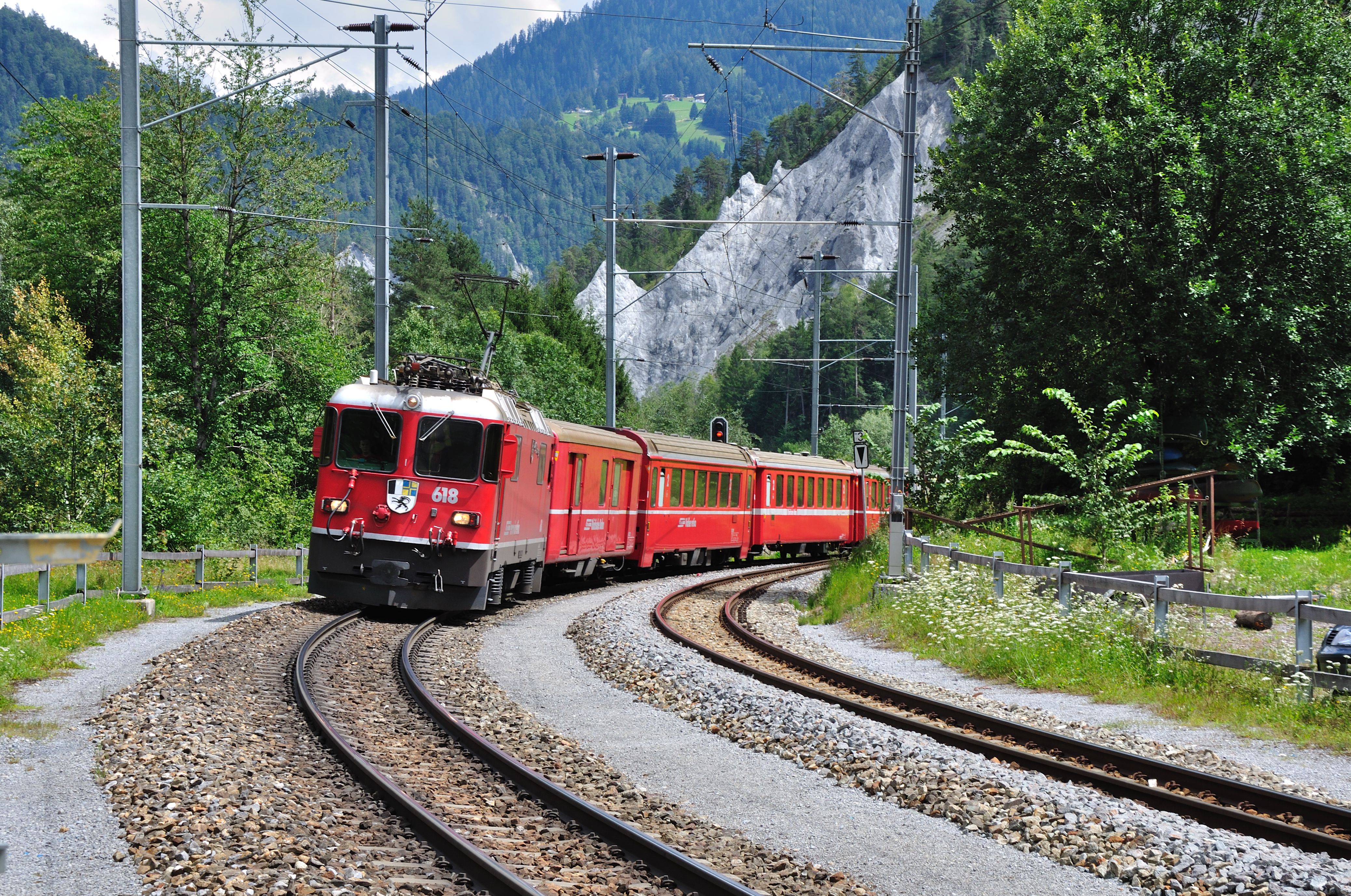 Switzerland, Graubünden, Rhine Gorge (Ruinaulta)